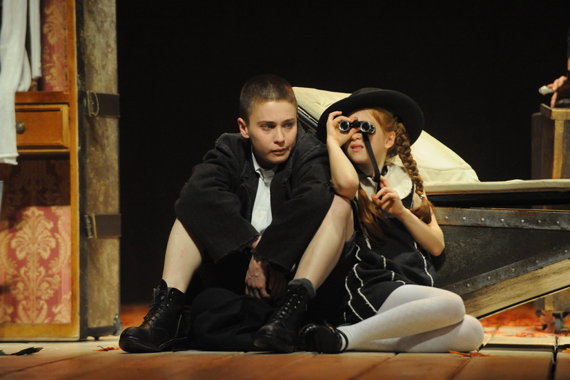 לוסי דובינצ'יק - שש דמויות מחפשות מחבר